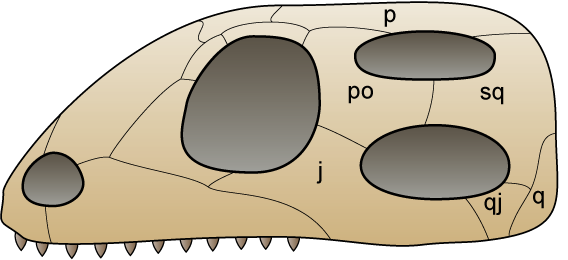 Skull of Diapsida